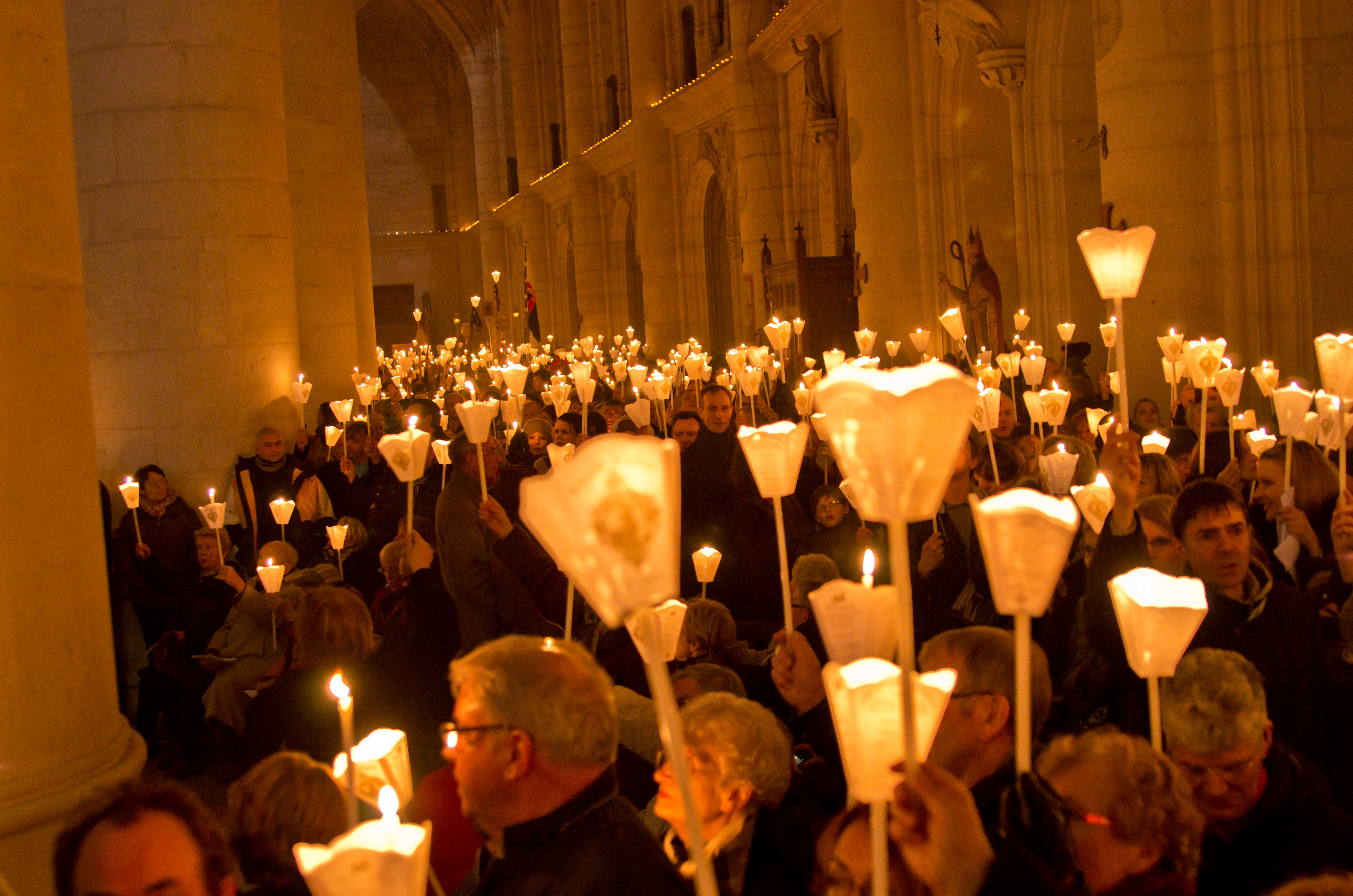 La procession annuelle de Saint Nicolas en la basilique de Saint-Nicolas-de-Port (2011)